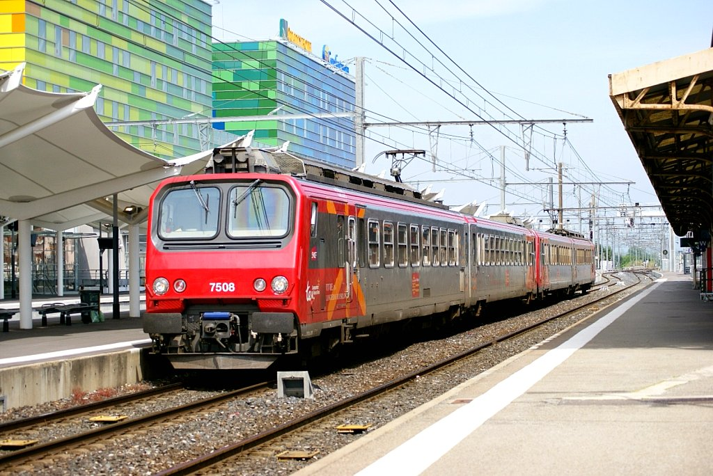 Ter format per dos automotors Z2 amb decoració Languedoc-Roussillon estacionats a l'estació de Perpignan. Ter compuesto por dos automotores Z2 con decoración Languedoc-Roussillon estacionados en la estación de Perpignan.